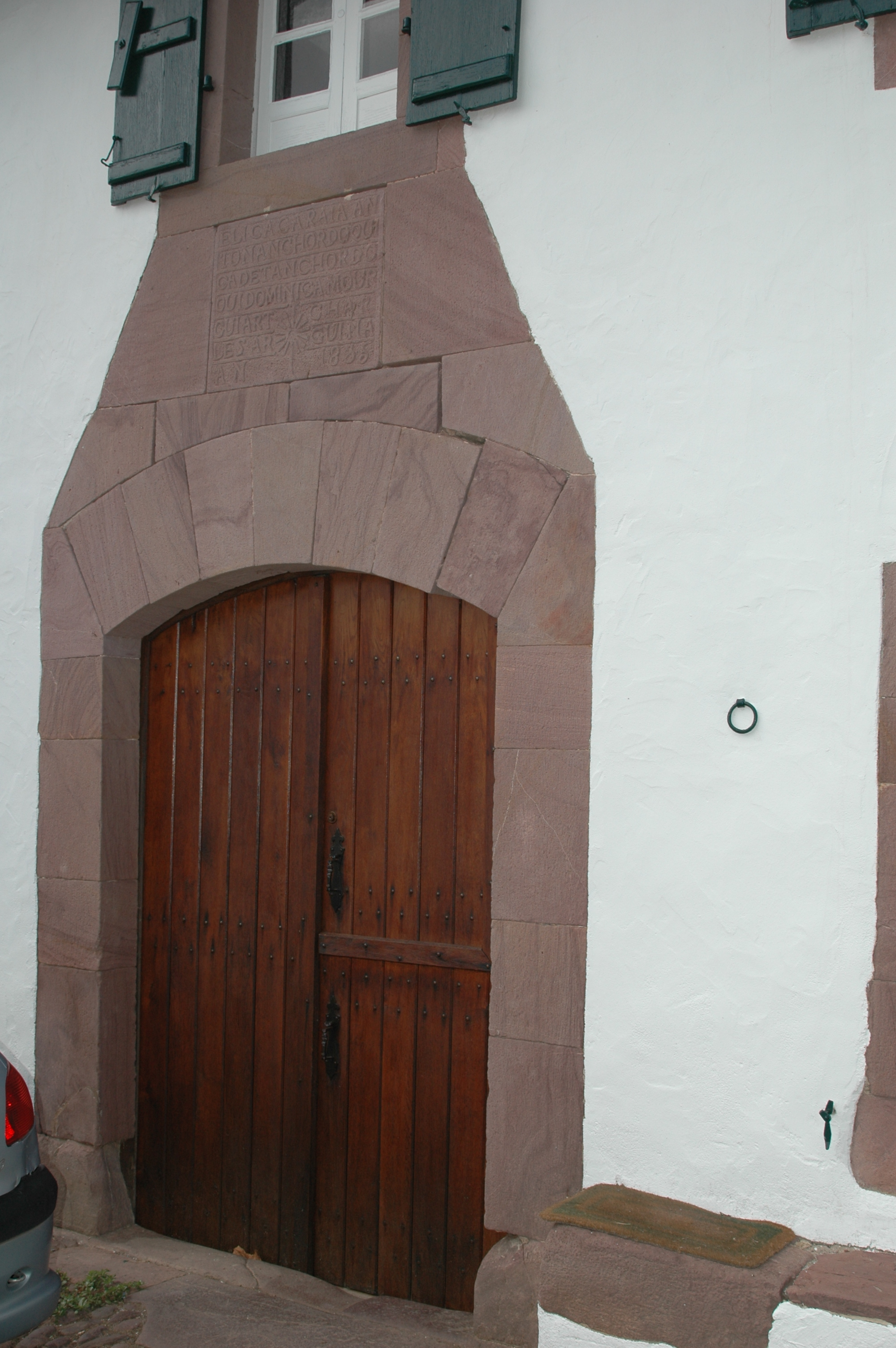 Bidarray, porte traditionnelle.